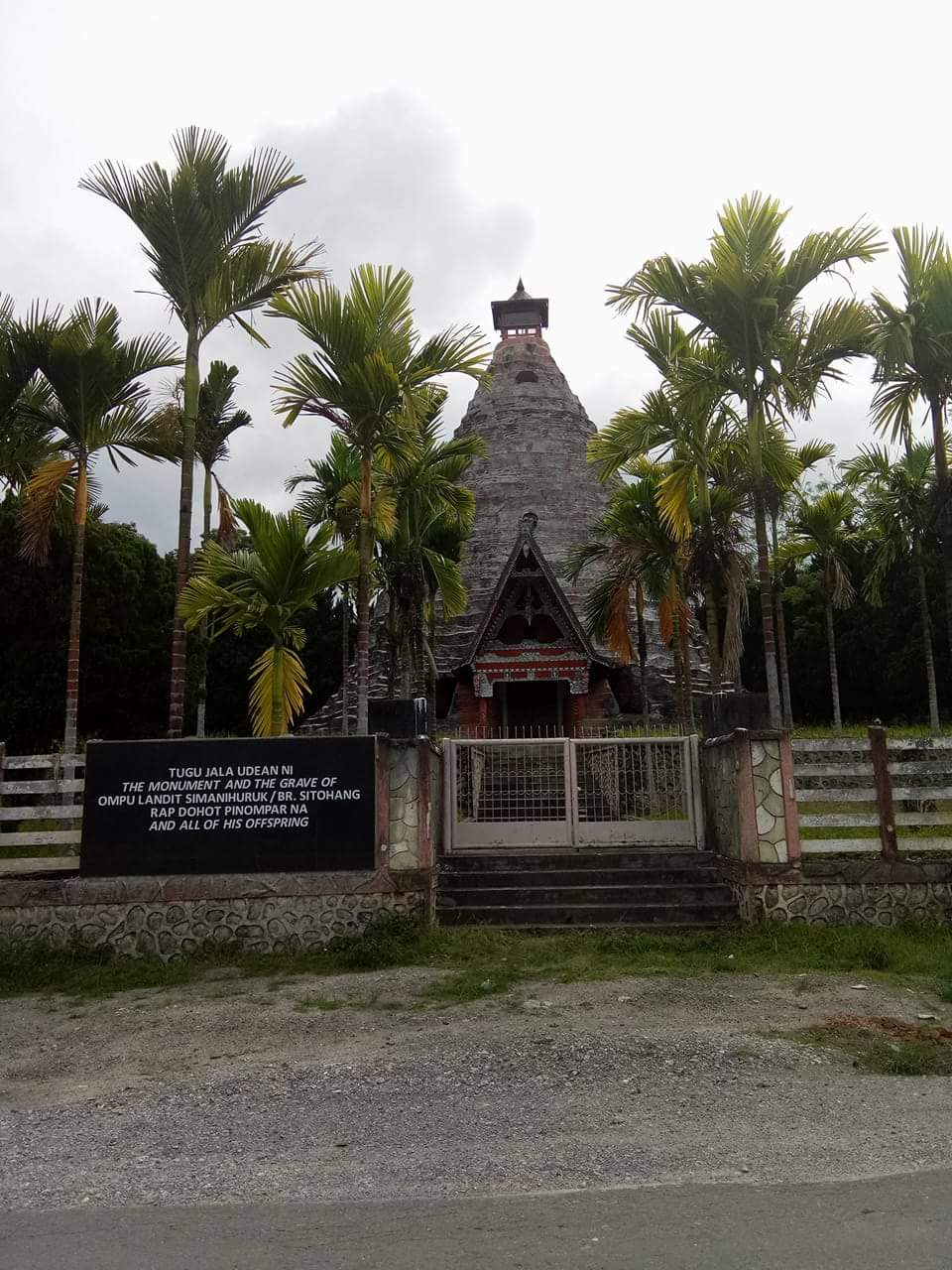 Di Binangaborta, Lumban Suhisuhi, Samosir